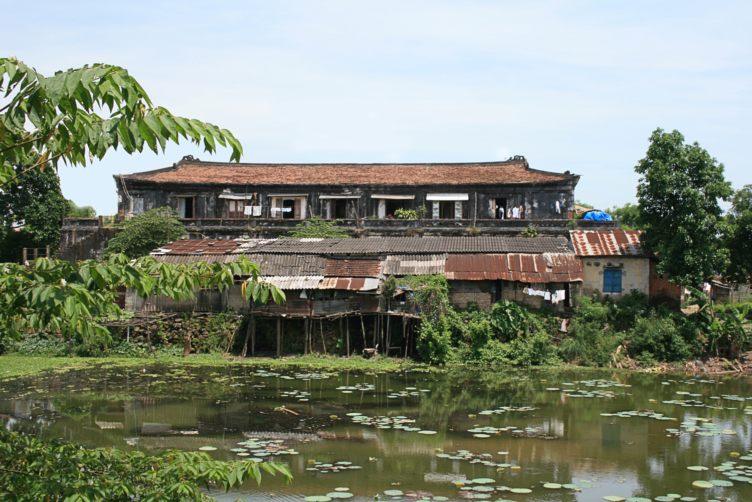 Tàng thư lâu tại Huế